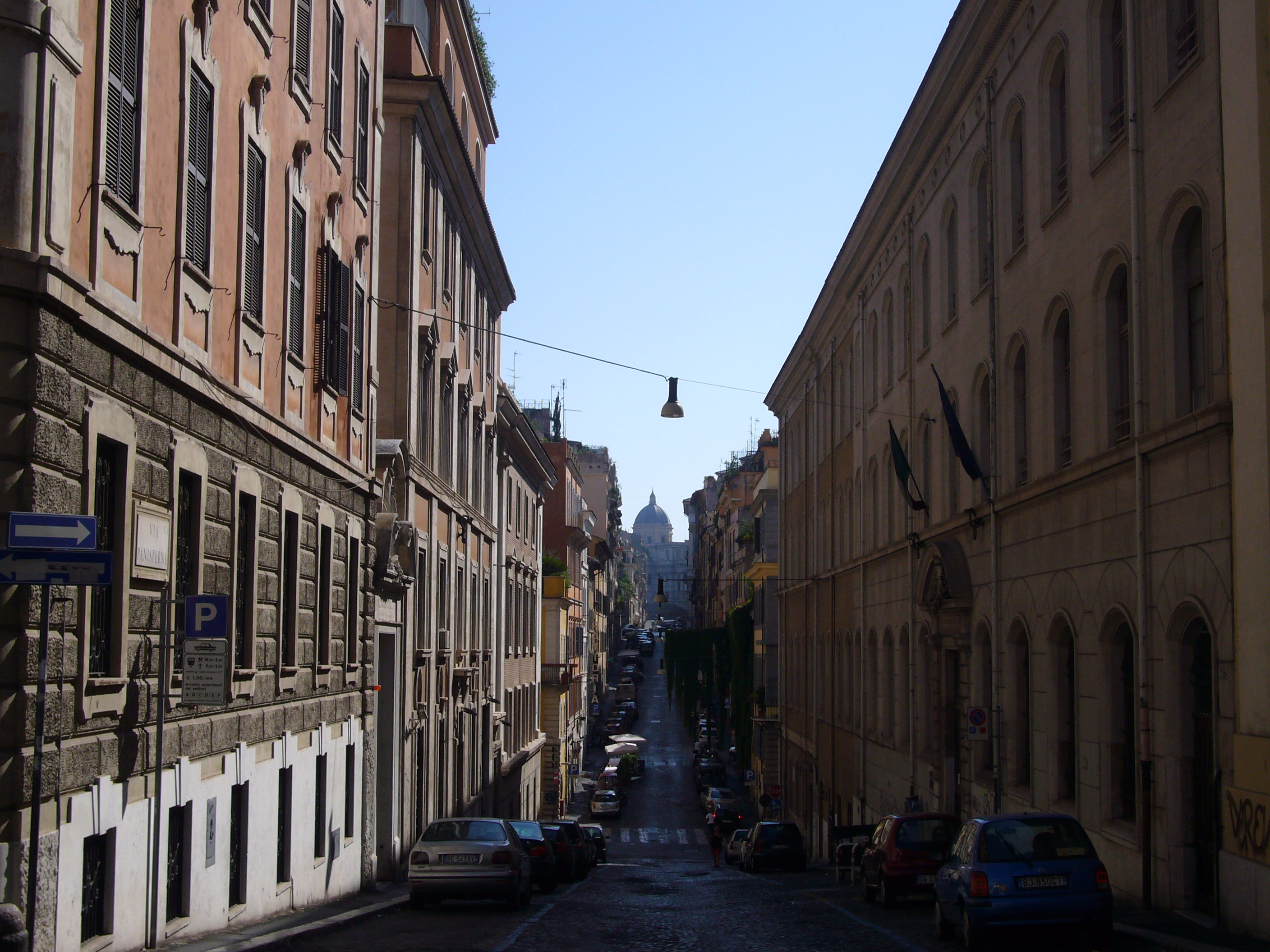 Roma, via Panisperna verso santa Maria Maggiore